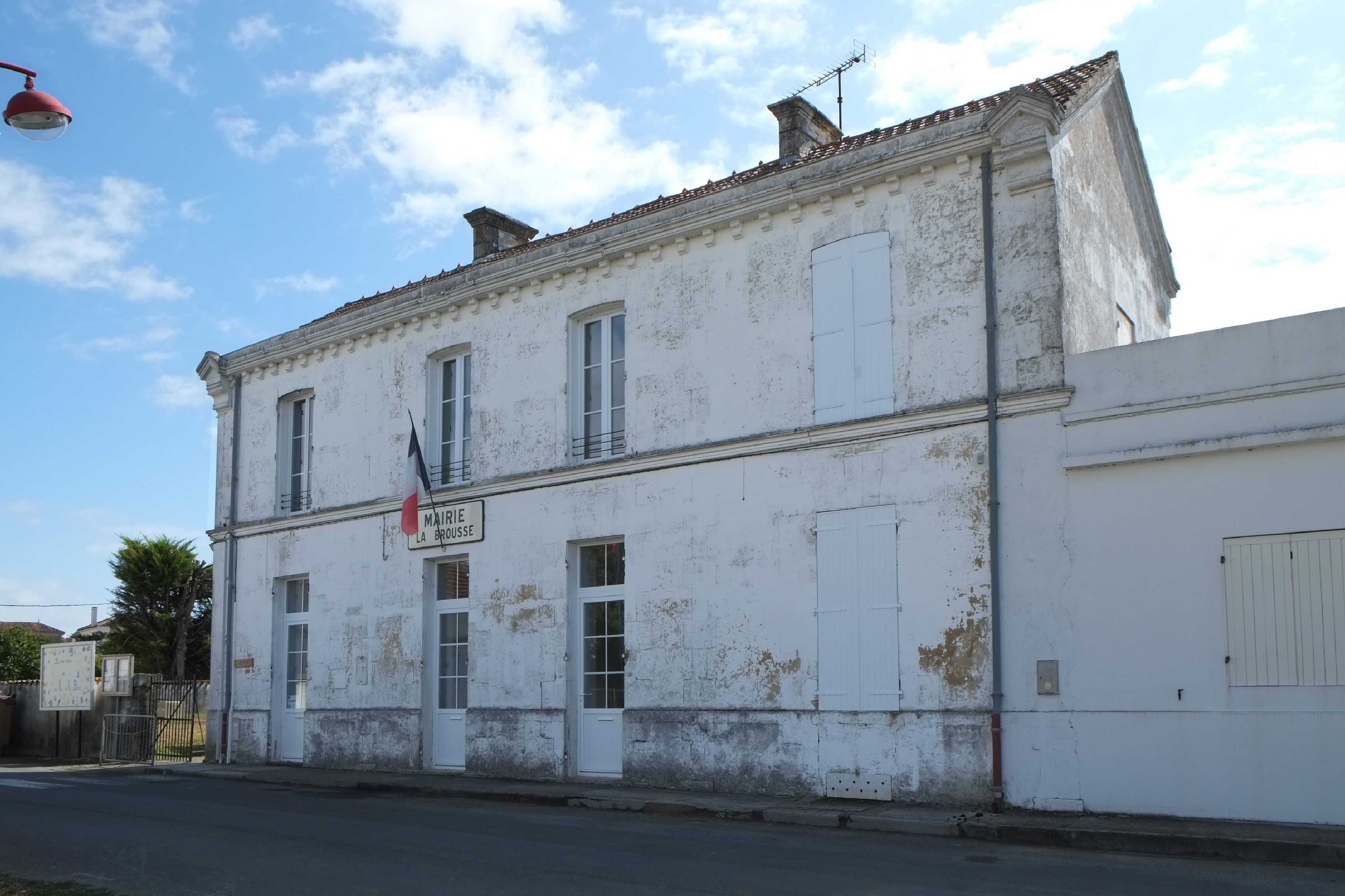 Mairie La Brousse Charente-Maritime France